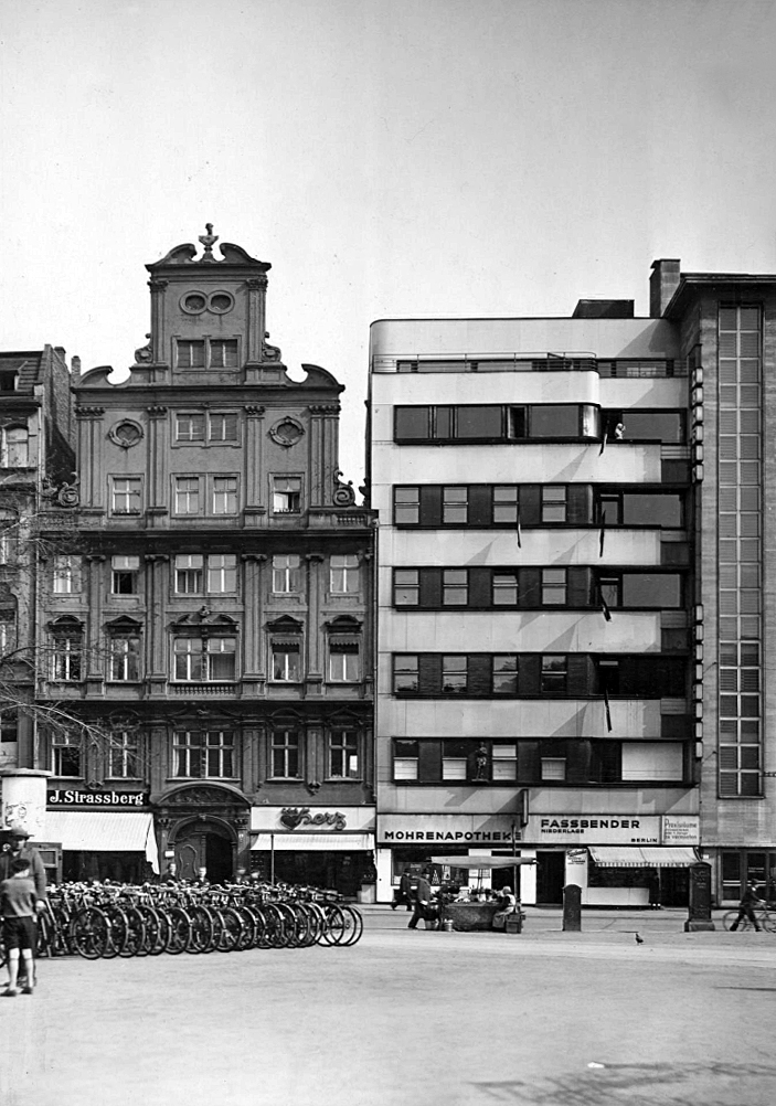 Wrocław, pl. Solny (Blücherplatz) 2/3 i 4, pierzeja północna. Apteka „Pod Murzynem” (Mohrenapotheke) (architekt Adolf Rading; czas przebudowy: 1925 i 1928. Parking dla rowerów.